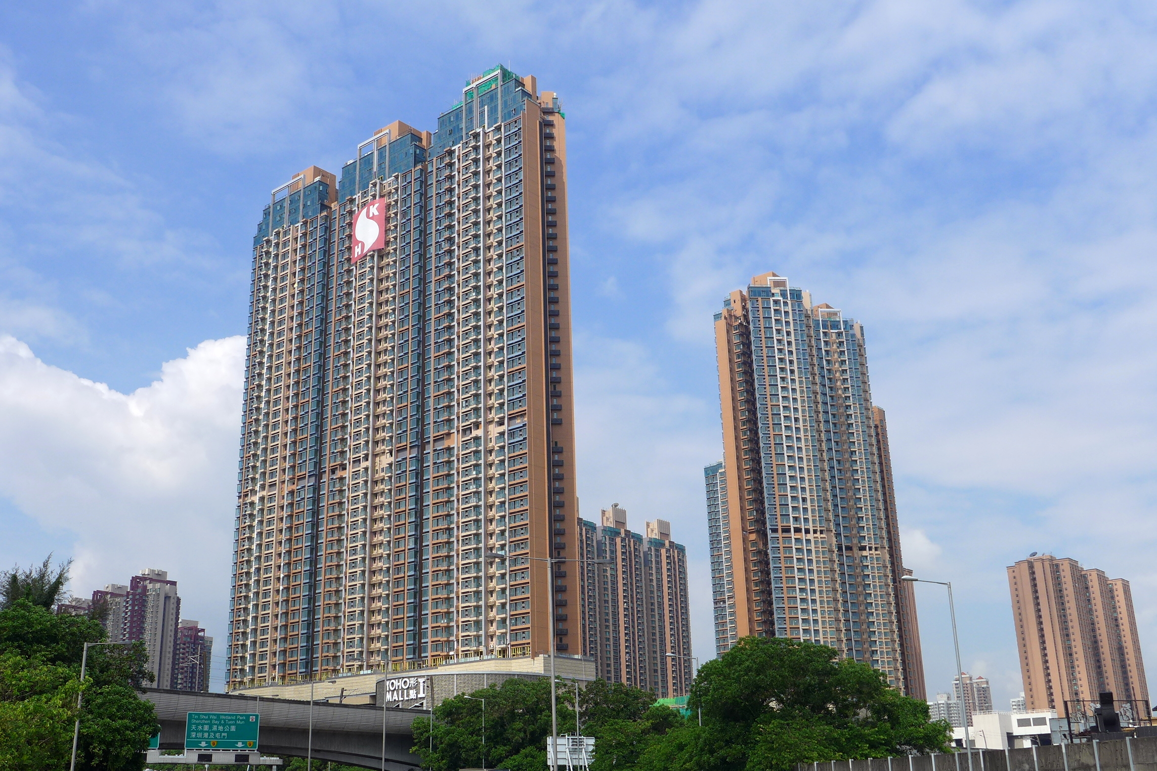 Grand YOHO Site view